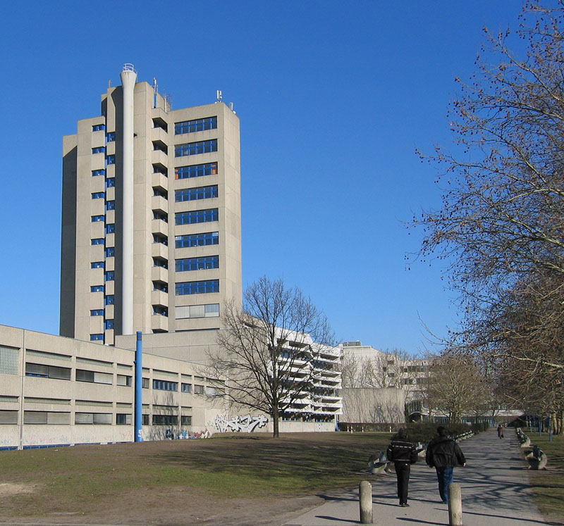 Haus Grashof der Technischen Fachhochschule Berlin.